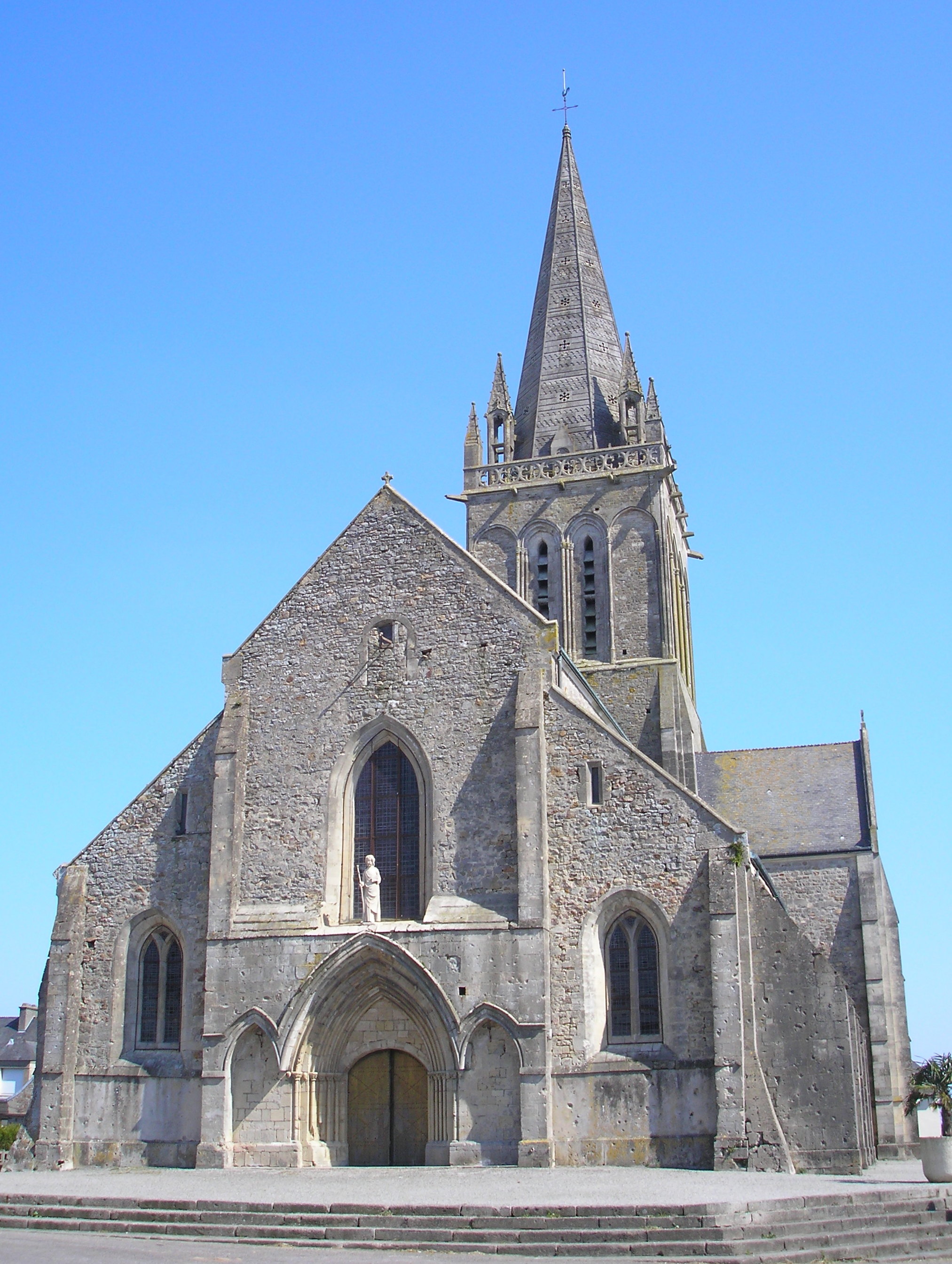 Montebourg (Normandie, France). L'église Saint-Jacques.